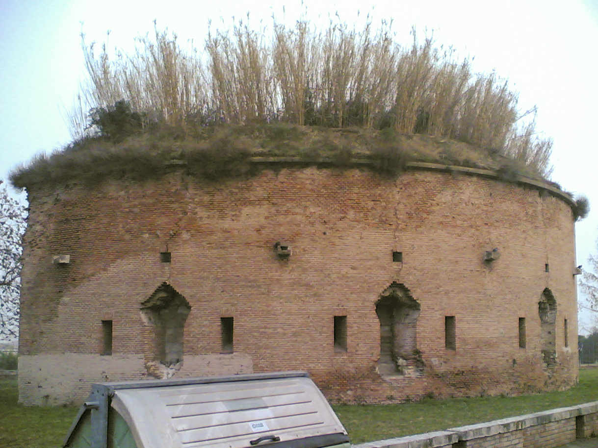 Retro del Forte San Zeno